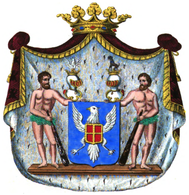 Armoiries de la Maison d'Aspremont de Lynden